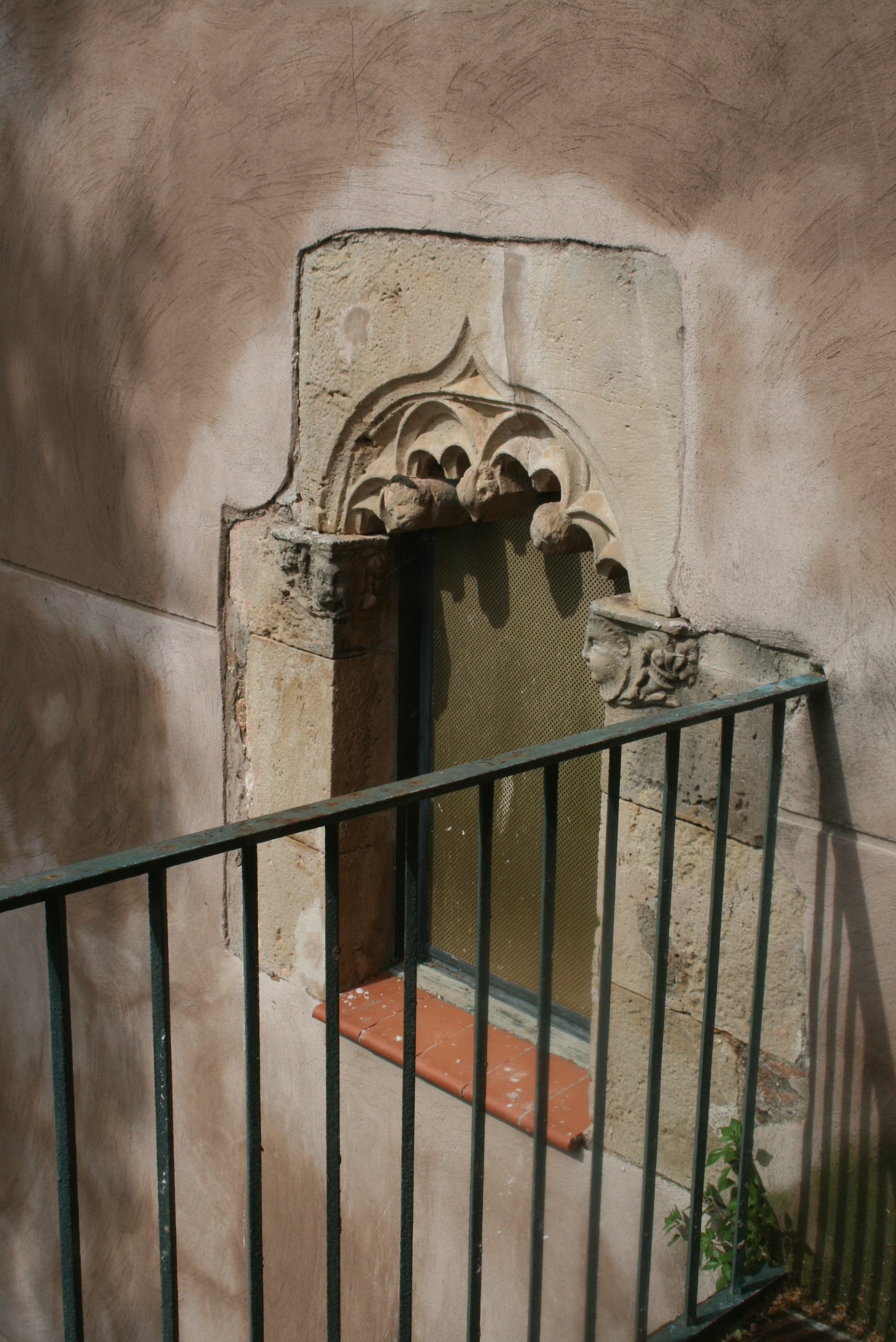 Finestra gòtica del castell de Mogoda